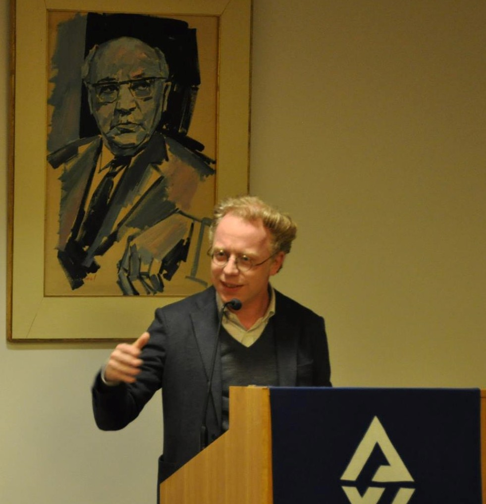 יונתן מאיר, מרכז זלמן שזר, 2017